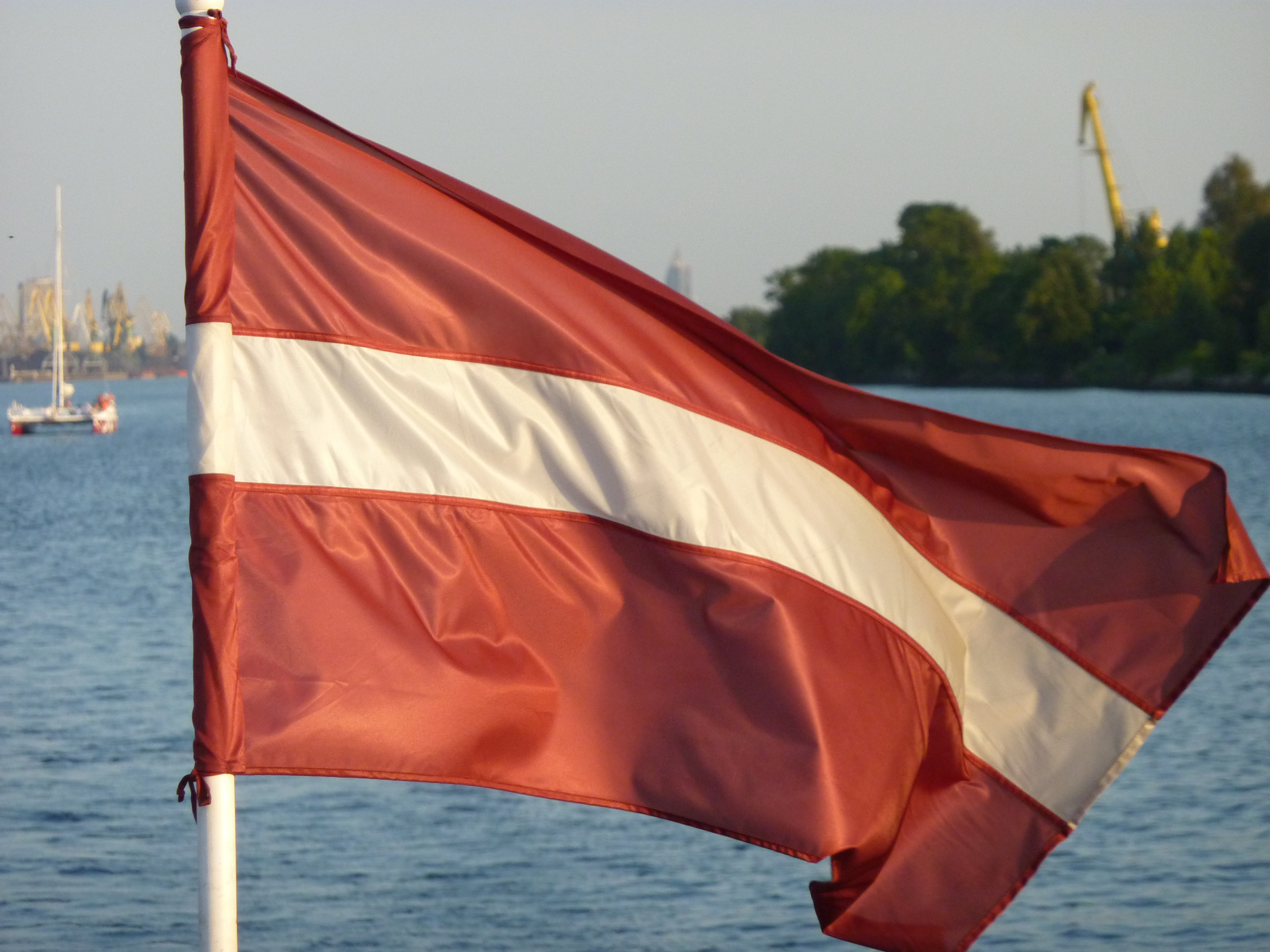 Bandera Łotwy na statku pasażerskim na Dźwinie, w Rydze